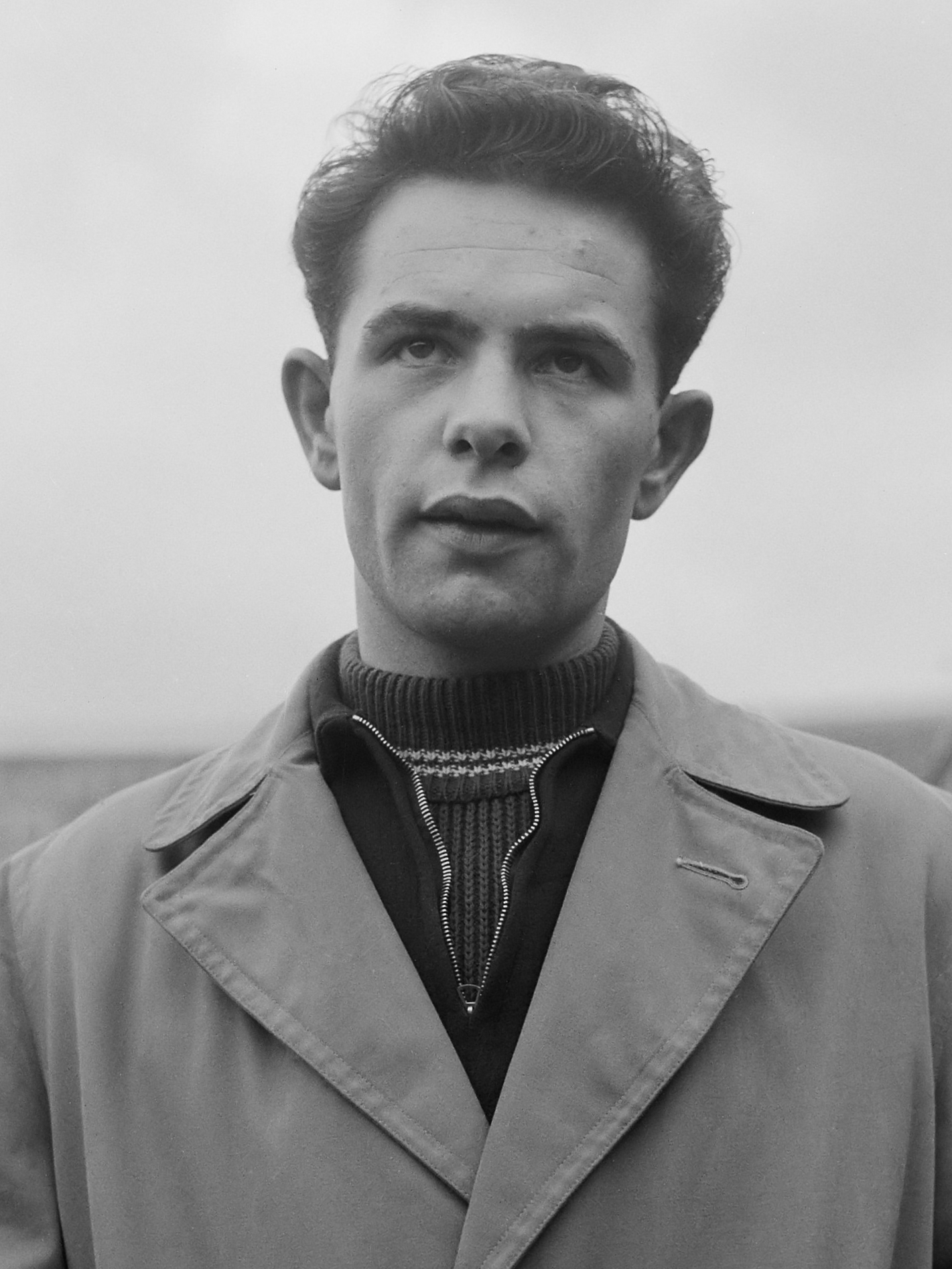 Nederlands elftal, Feyt ( Willem II ) 6 oktober 1955